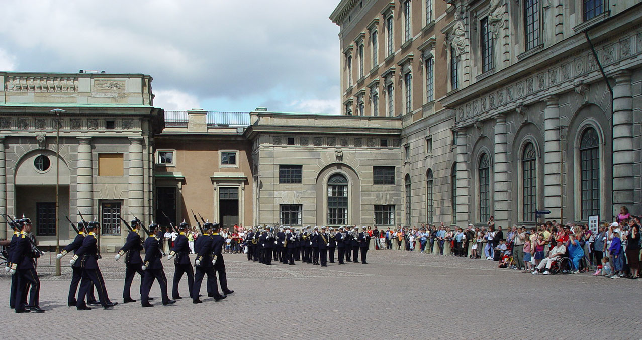 Stockholmer Schloss - Wachablösung